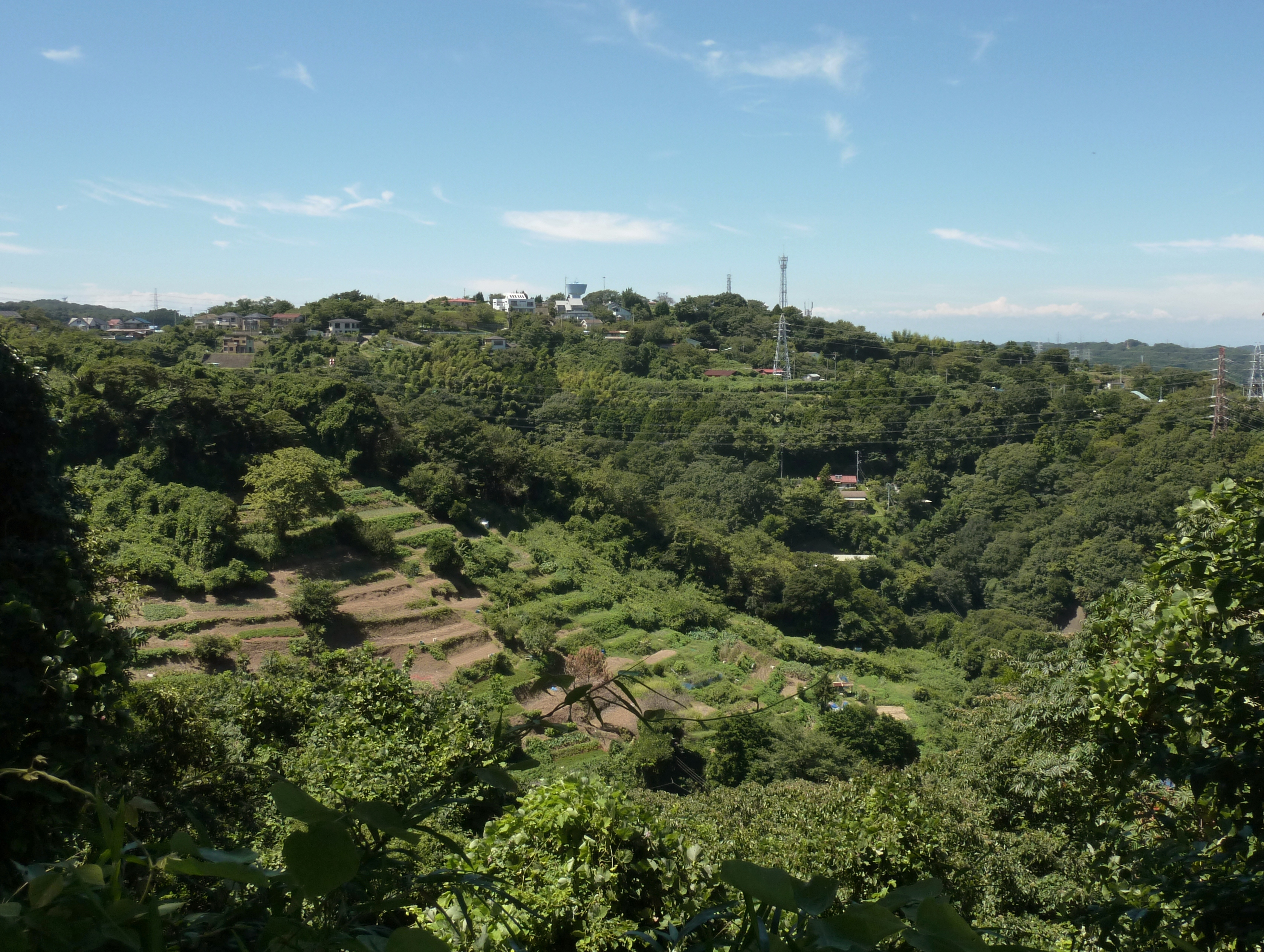 塚山公園から見た十三峠（神奈川県横須賀市）